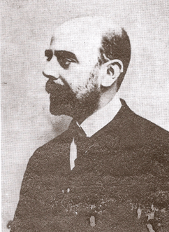 Juan Ramón Fernández, médico que fue ministro de Instrucción Pública entre 1903 y 1904, gracias al cual se creó el Profesorado en Lenguas Vivas